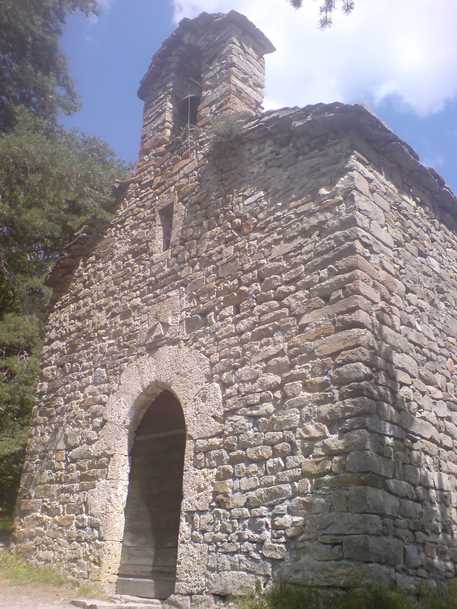 Façade de la chapelle dite templière (incertain) de Saint-Léger, au-dessus de Montclar